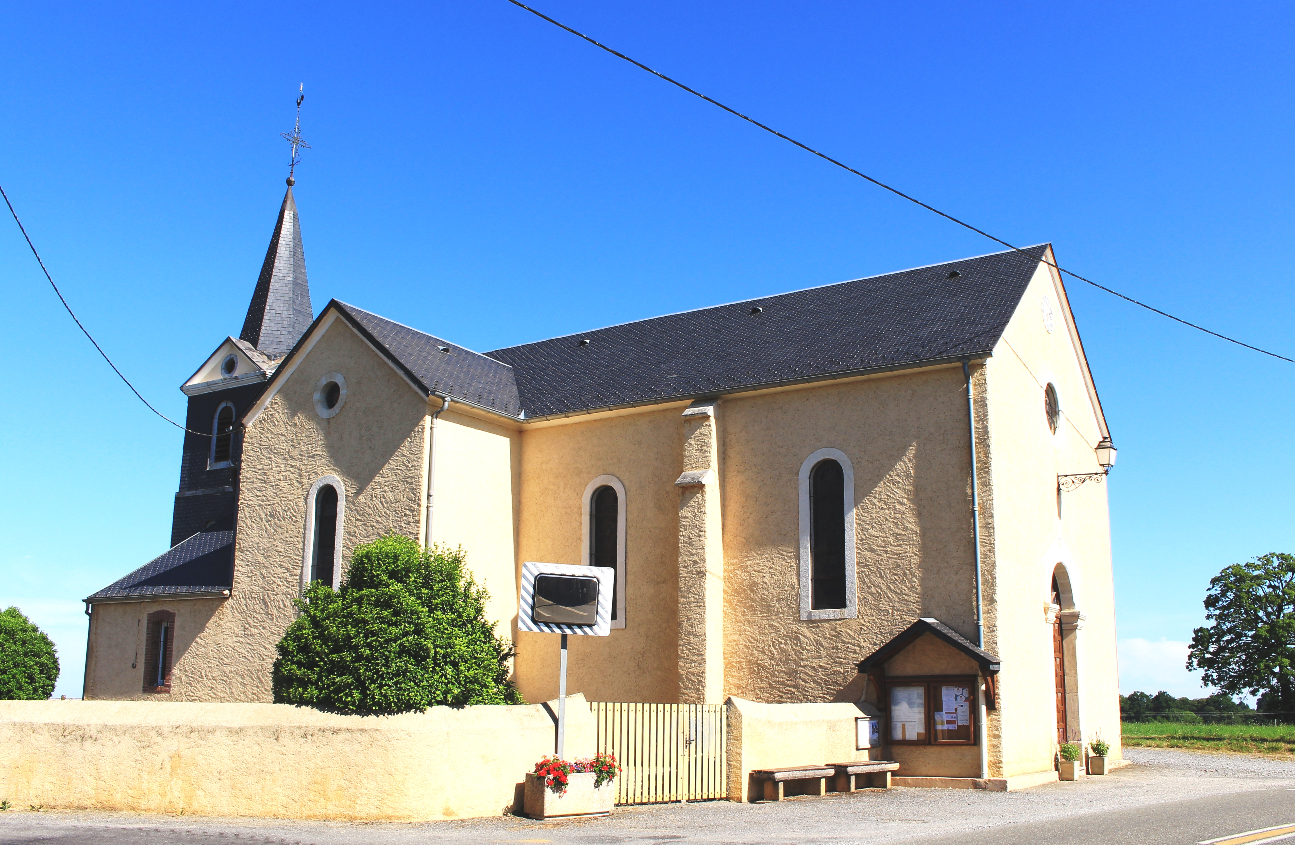 Église de la Nativité-de-la-Sainte-Vierge de Houeydets (Hautes-Pyrénées)